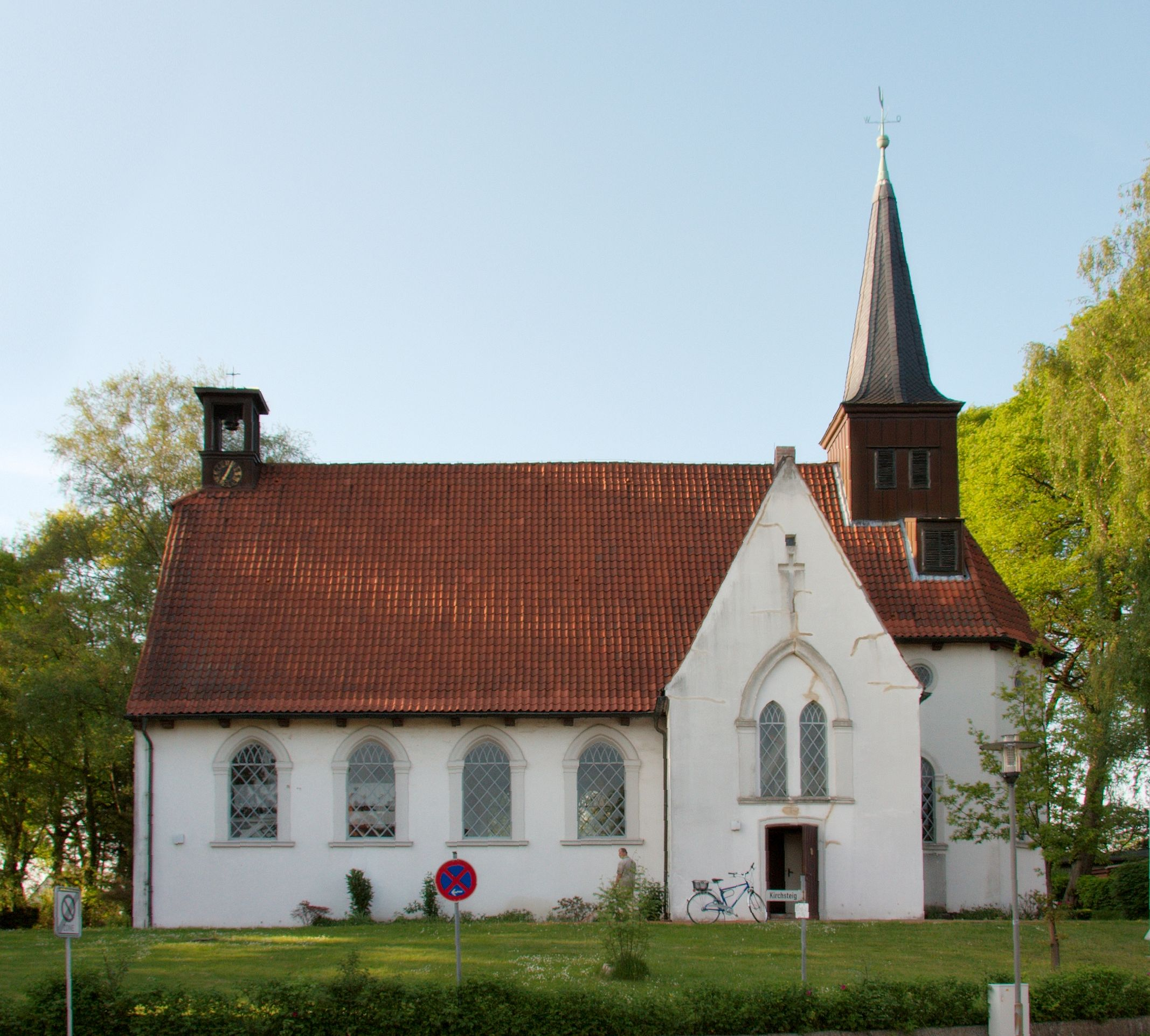 Matthias-Claudius-Kirche Reinfeld/Holstein (Germany).